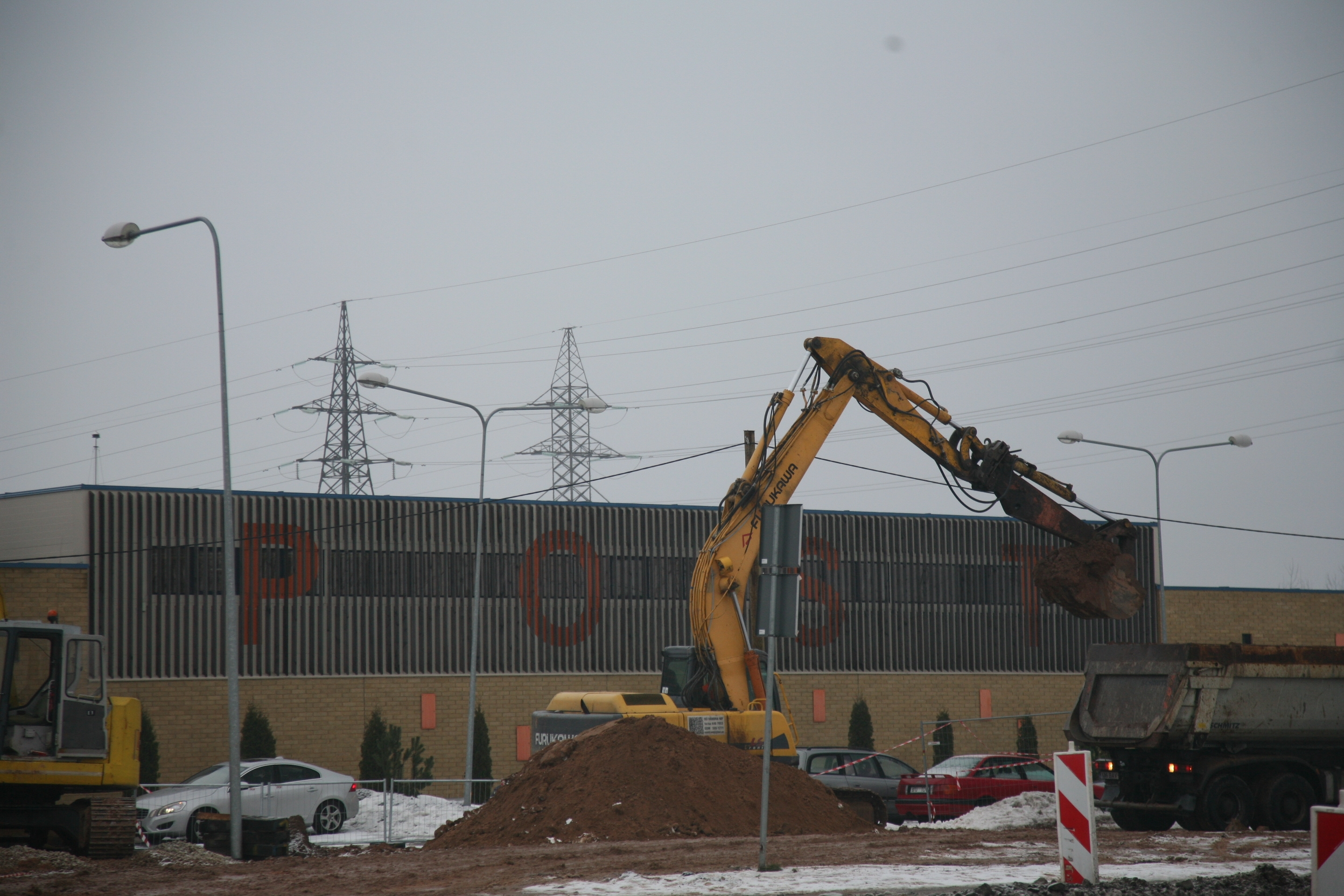 Tartu Postimaja liiklussõlme ehitustööde ajal, 1. veebruar 2013